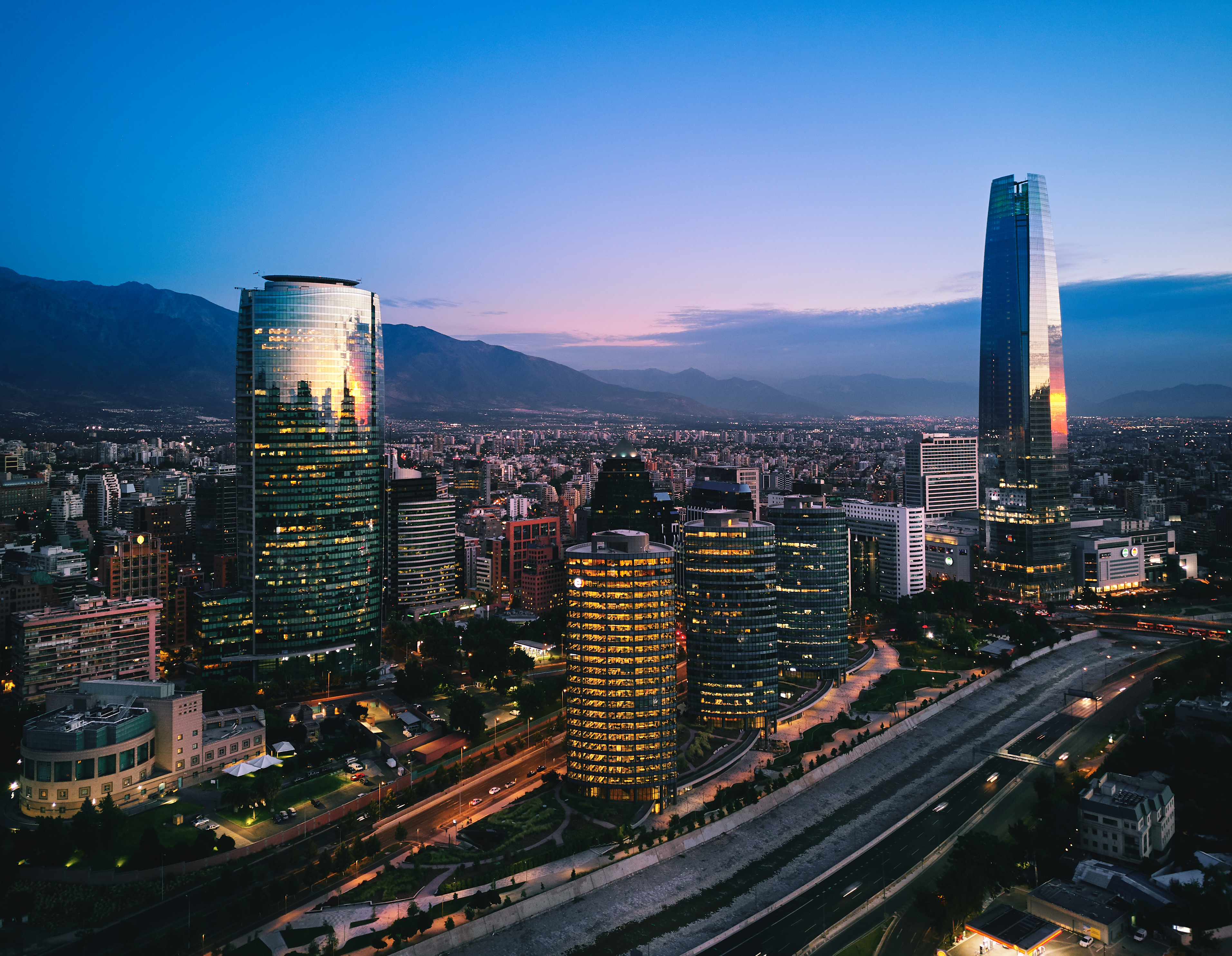 Las Condes